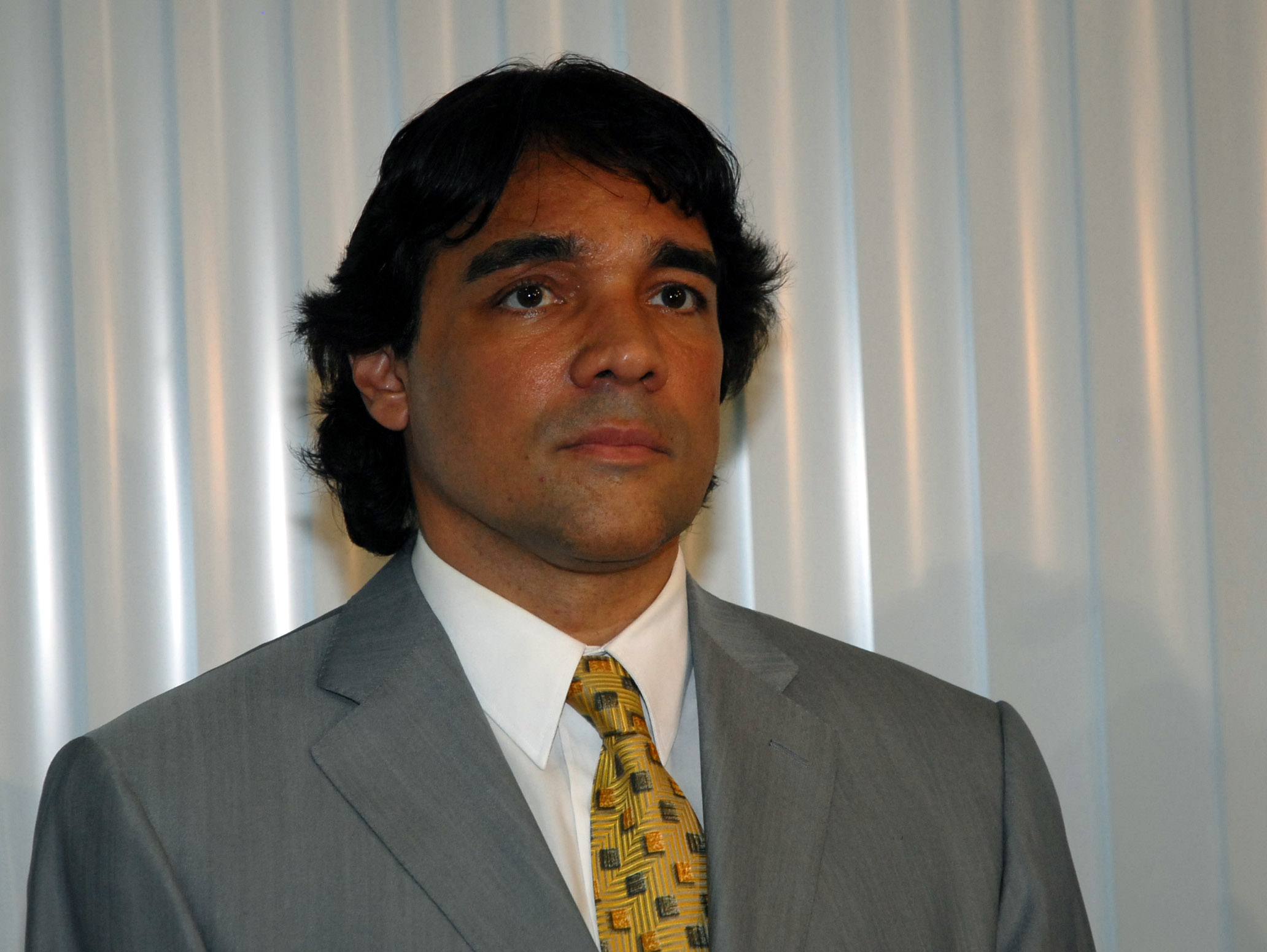 O político brasileiro Edison Lobão Filho.